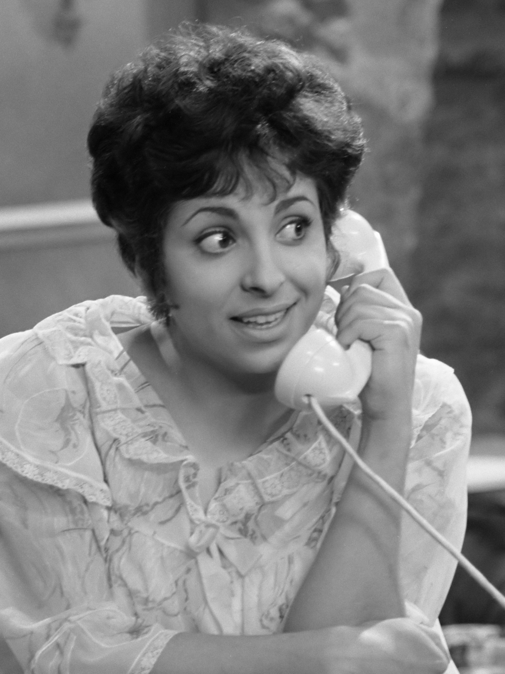 TV spel Meneer Maure / Shireen Strooker 1 maart 1961